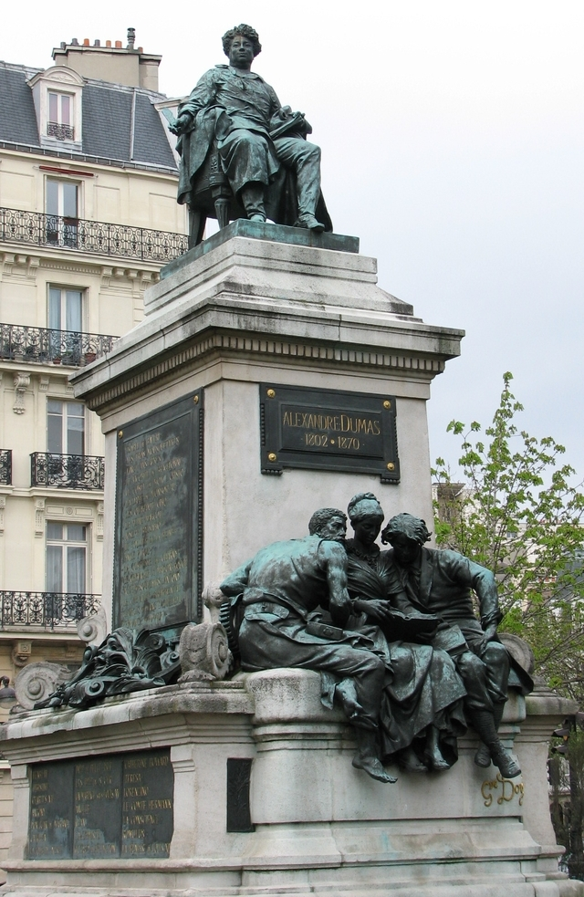 Памятник Александру Дюма в 17-м округе Парижа, пл. генерала Катру (Catroux)